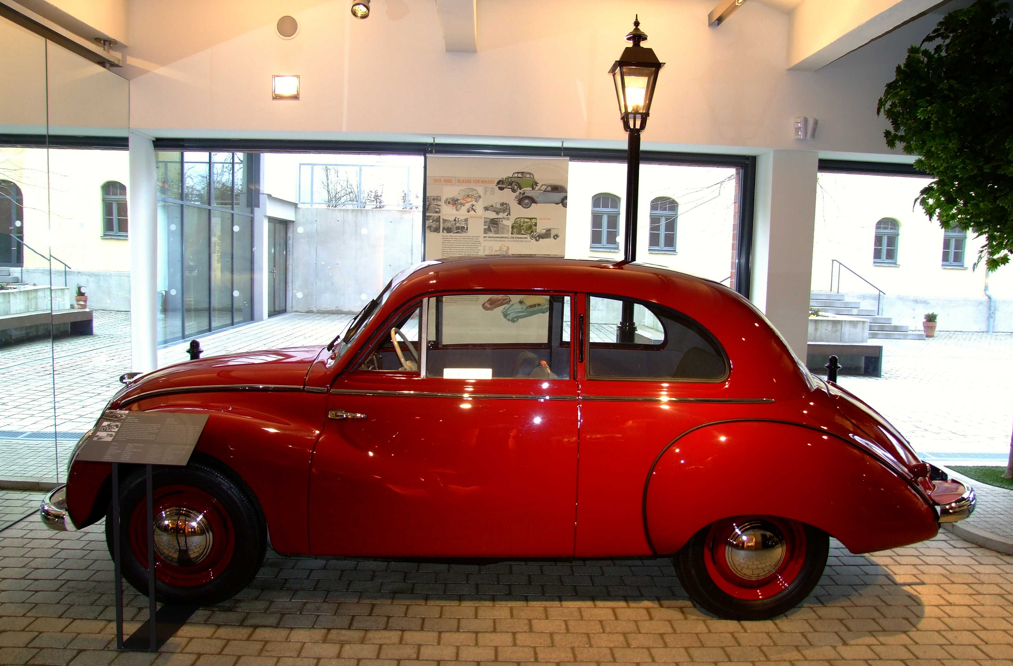 ifa f9